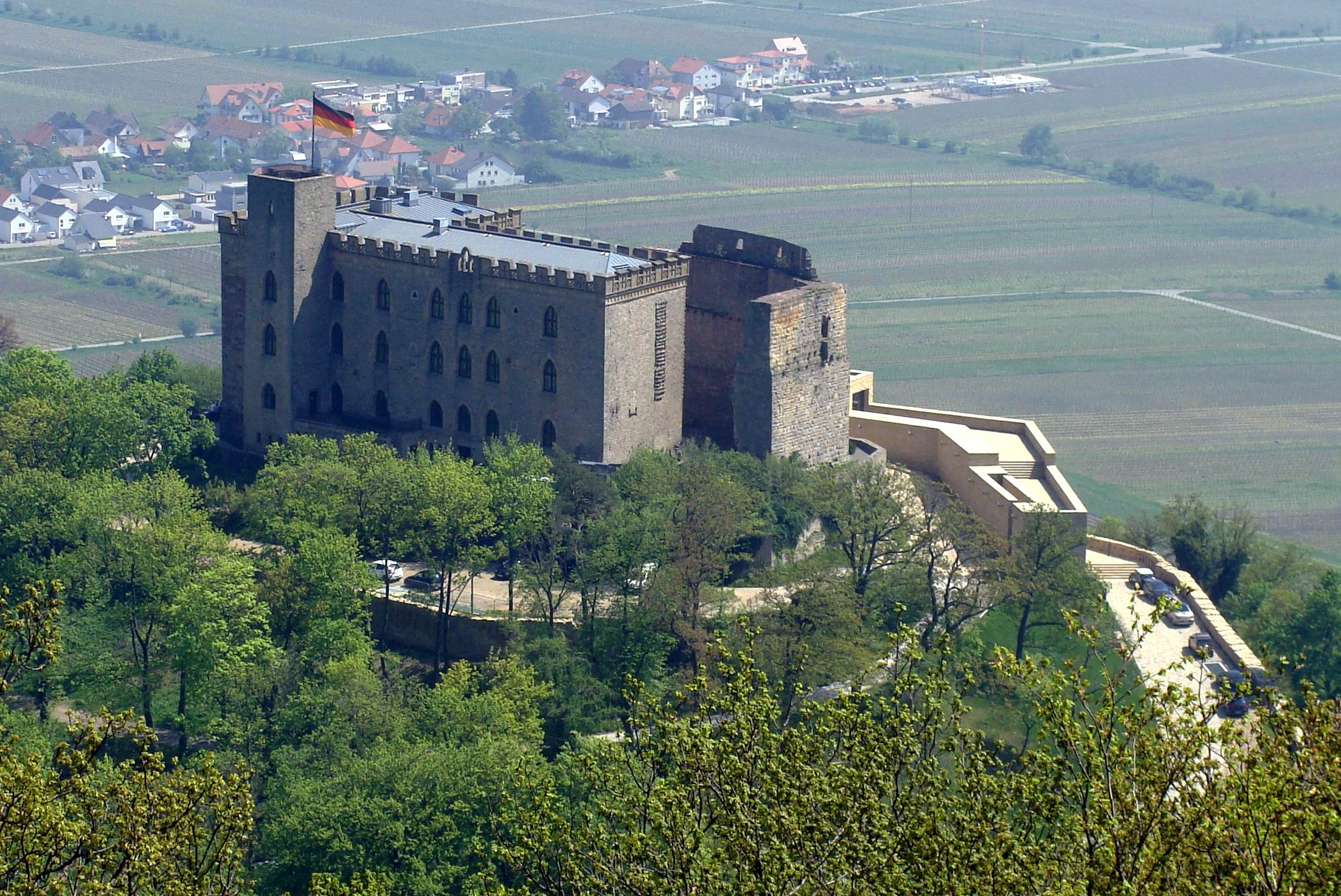 Hambacher Schloss - Blick vom Sühnekreuz am Rittersberg